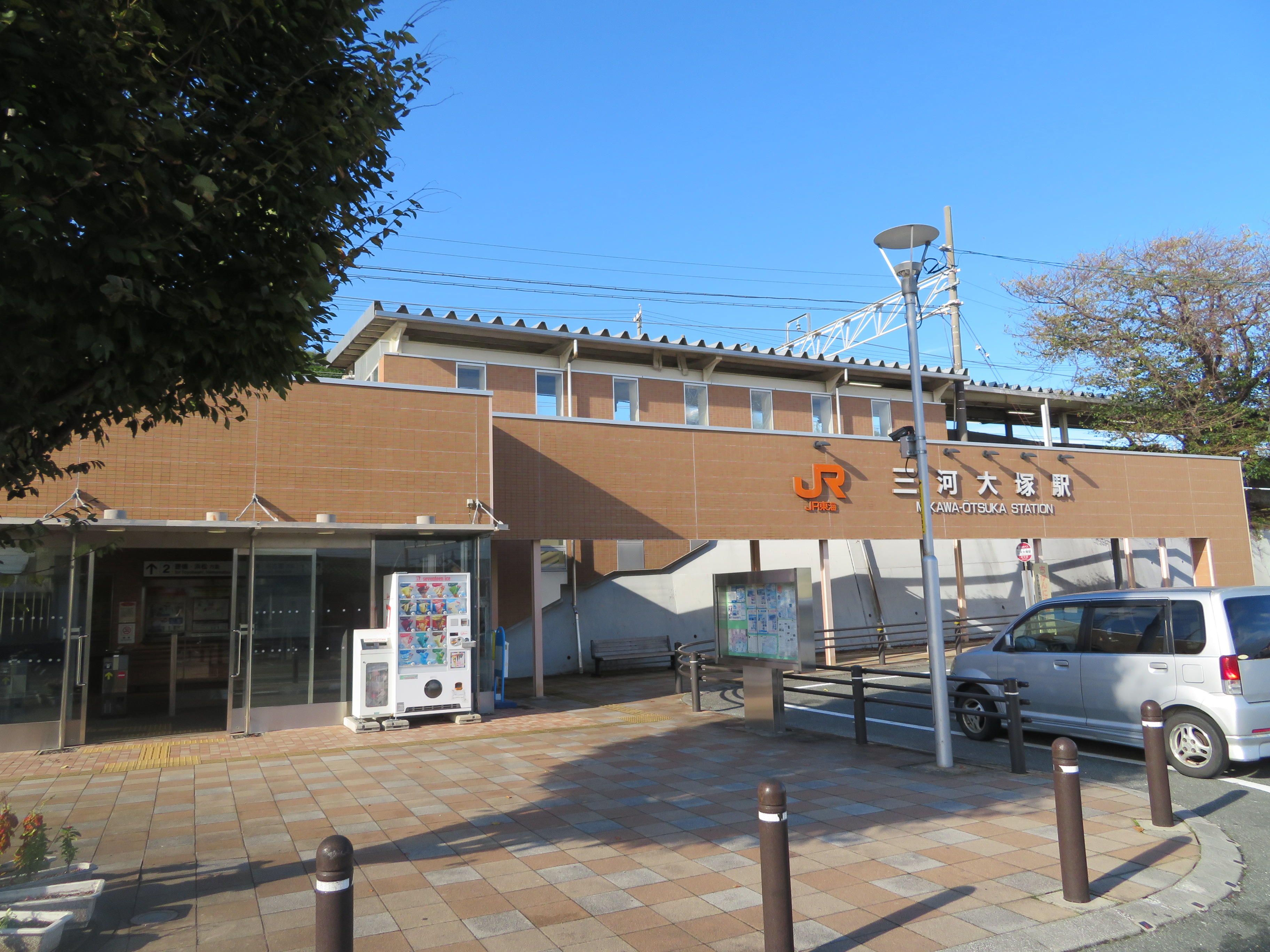 JR東海・三河大塚駅